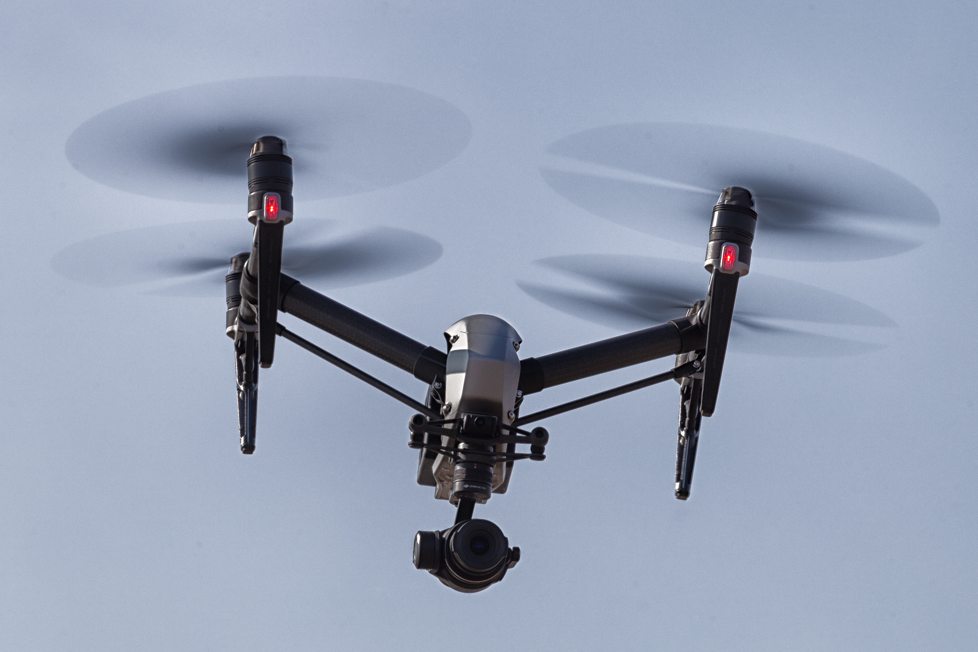 DJI Inspire 2 mit X5S-Kamera & Gimbal, als Objektiv aufgesetzt ist ein Olympus Zuiko 14-42 pancake mft-Zoom.